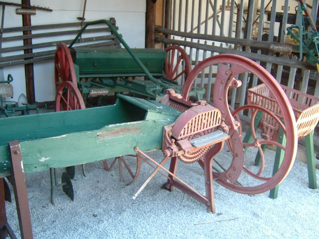 Häckselmaschine, (Openairmuseum Lochmühle bei Wehrheim) zum Zerkleinern von Rüben und Mais etc. Das Schwungrad wird von Hand gedreht, das Häckselgut in der Holzführung nachgeschoben.